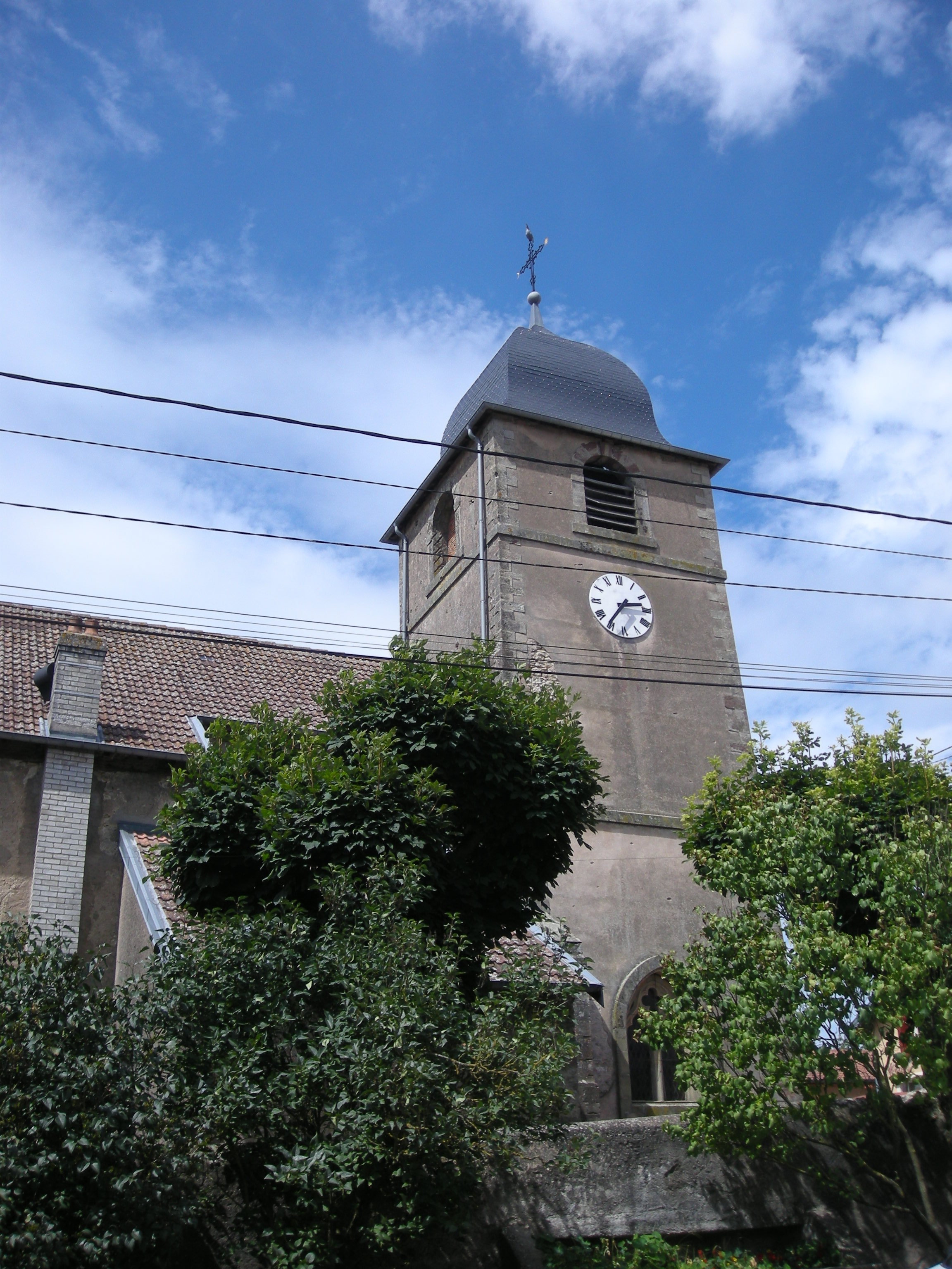 Le clocher de l'église de Reherrey (Meurthe-et-Moselle)